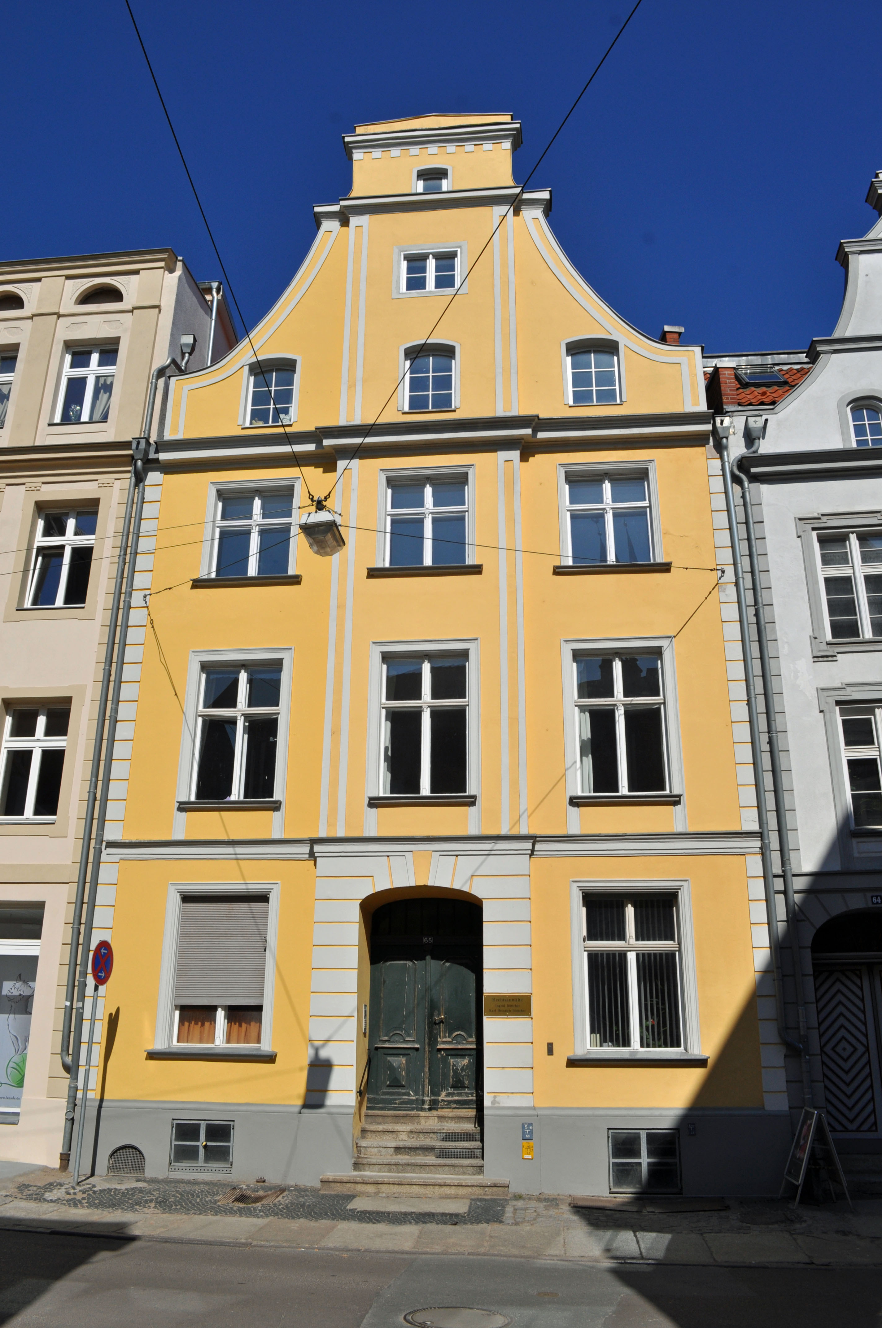 Gebäude bzw. Gebäudedetail in Stralsund. Straße und Hausnummer siehe Dateiname.